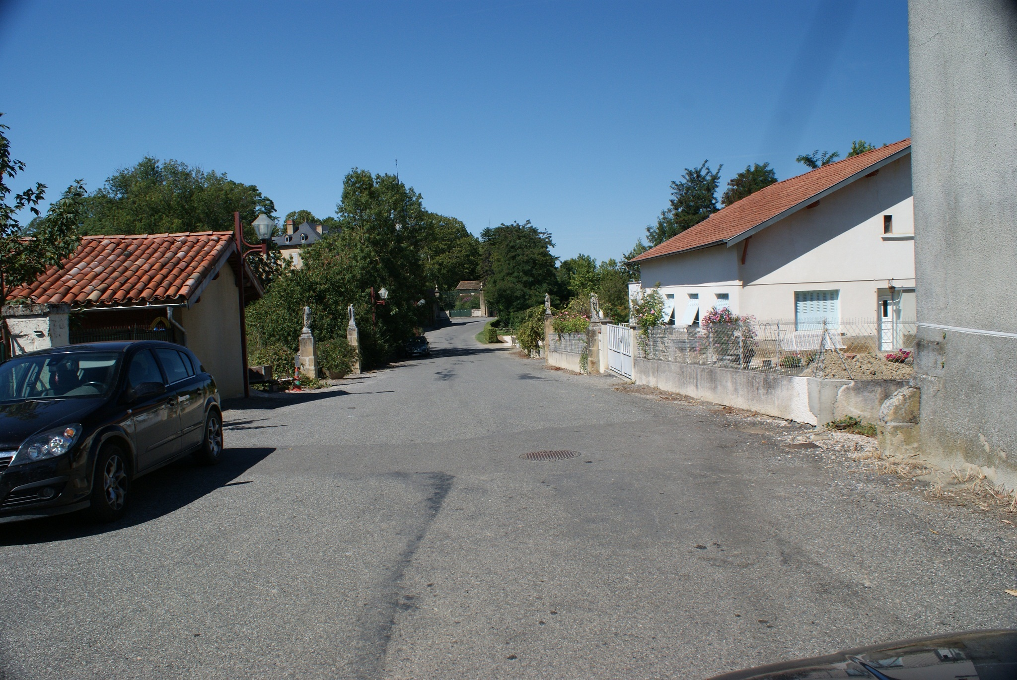 In Péguilhan in de Haute-Garonne in Frankrijk is langs de D90 westwaarts een huis met 6 beelden aan weerszijde van de weg. Voorstellende Maria met 5 engelen.